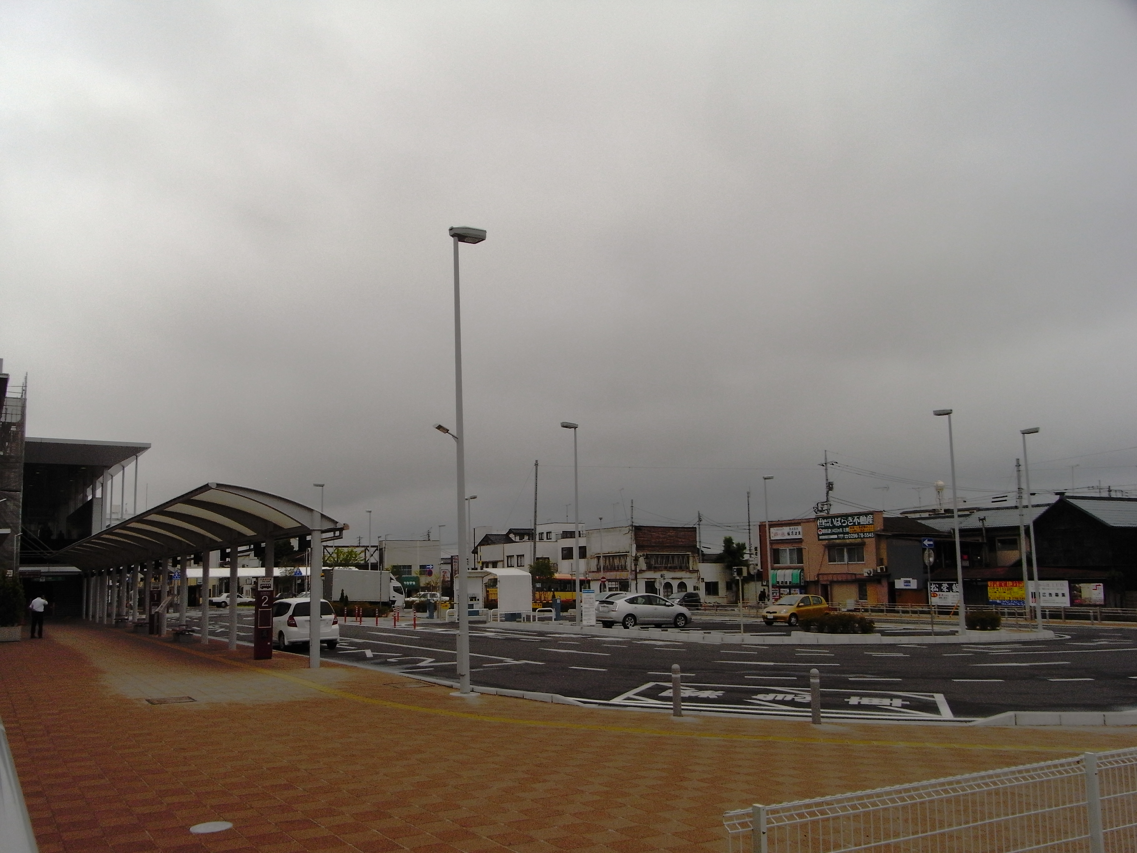 友部駅前